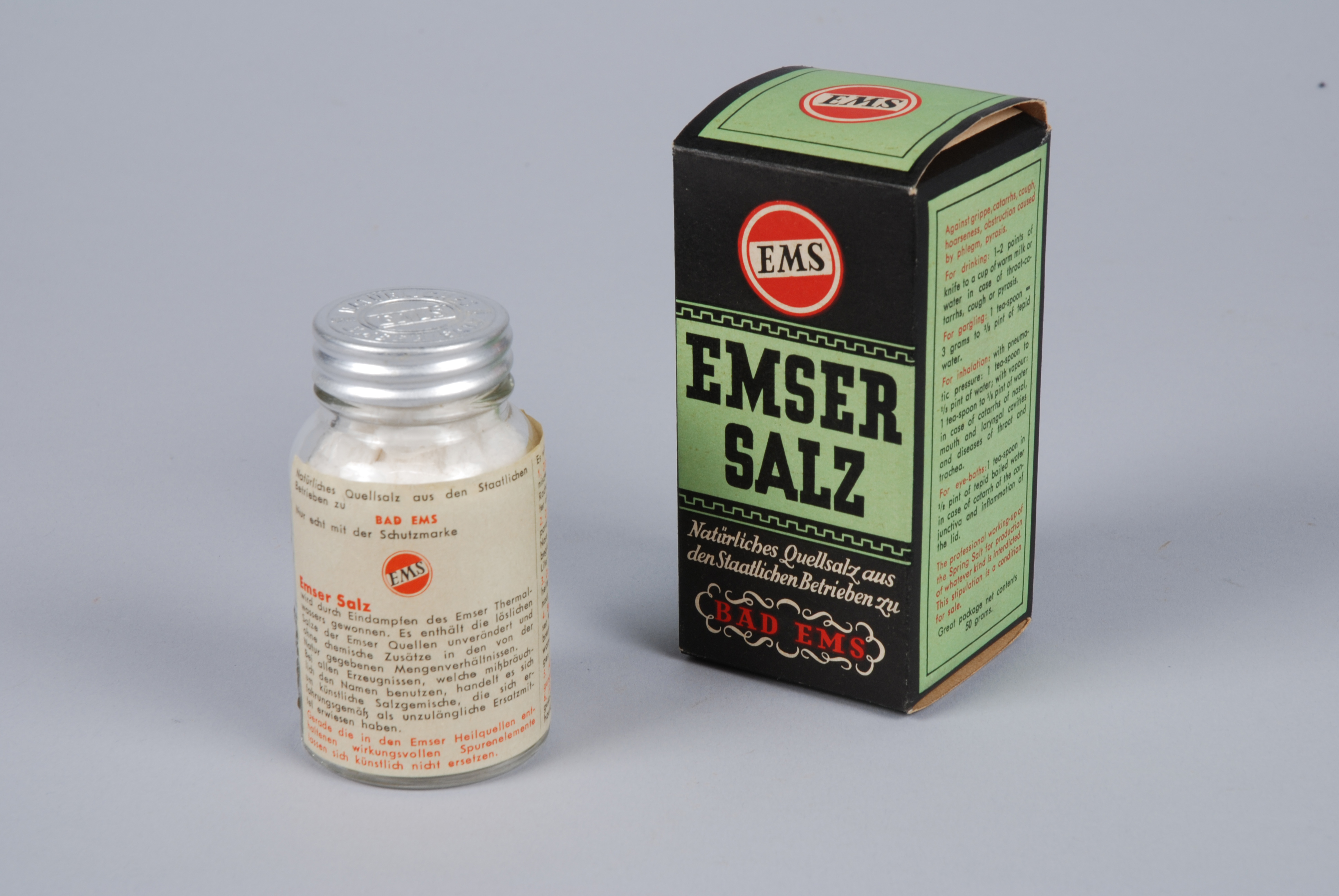 Objectgegevens Titel: Rechthoekige kartonnen doos “EMSER SALZ” met daarin kleurloze fles met metalen schroefdop, etiket en wit poeder als inhoud Beschrijving: A 1-2. verpakking: doos en los stuk ribbelkarton; B 1-2. fles en dop. Dit medicijn hielp volgens de verpakking tegen griep, verkoudheid, hoesten, schorheid, obstructie door slijm en brandend maagzuur en kon ingenomen worden door het middel op te drinken, te inhaleren, er mee te gorgelen en het kon gebruikt worden voor oogbaden. Trefwoorden: fles, doos, productverpakking, houder Opschrift / merk: Gedrukt op verpakking: "EMS / EMSER SALZ / Natürliches Quellsalz aus / den Staatlichen Betrieben zu / BAD EMS" en vervolgens gebruiksaanwijzingen in Engels, Duits en Frans. Gedrukt in fles: "EMS / EMSER SALZ" en gedrukt in dop: "EMS / NATÜRLICHES EMSER SALZ / SCHUTZ MARKE". Gedrukt op etiket: een Duitse gebruiksaanwijzing. Plaats vervaardiging: Duitsland, Bad Ems Datering: 1945 - 1960 Materiaal: glas, metaal, karton, papier, inkt Afmetingen: (cm) doos: hg 10,5 / br 5,0 / dp 5,0 Associatie: reclame, verpakken, apotheek, medicijn, geneesmiddel, medisch handelen, gezondheidszorg, Bad Ems, Lahn, Kür Vorm & decoratie: verpakking Inventarisnr: Museum Rotterdam 43766-A-B